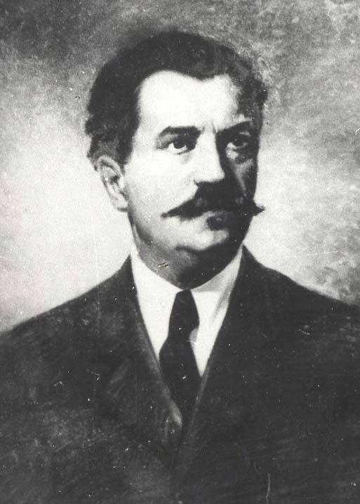 Dumitru Theodor Neculuță